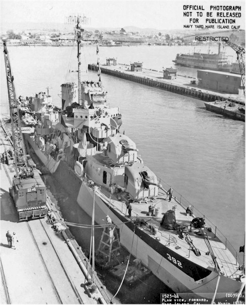 USS Patterson (DD-392) mit Tarnanstrich